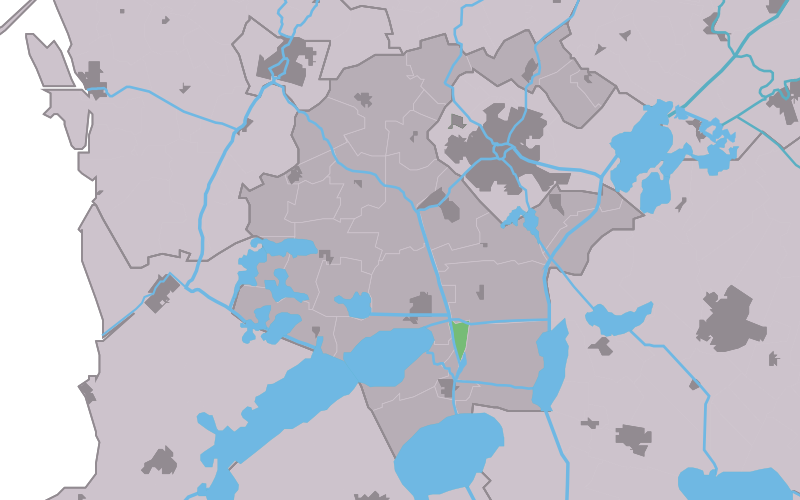 Kaartsje fan himrik fan Smelbrêge